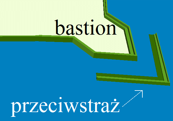 Bastion i przeciwstraż.